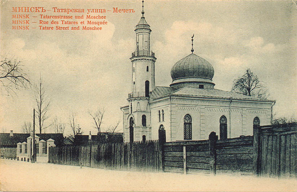 Беларуская (тарашкевіца): Менск (Miensk), Татарская Слабада (Tatarskaja Słabada). Татарскі мячэт